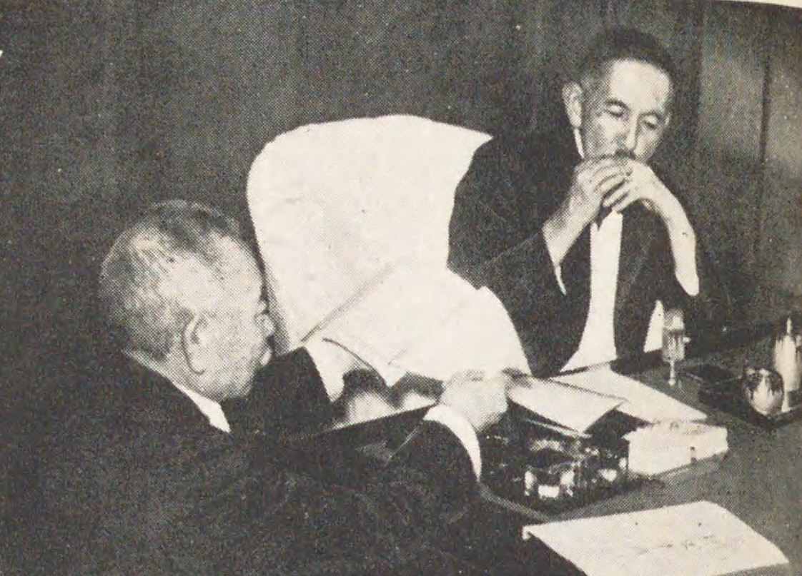 望月圭介逓信大臣（1935年-1936年）